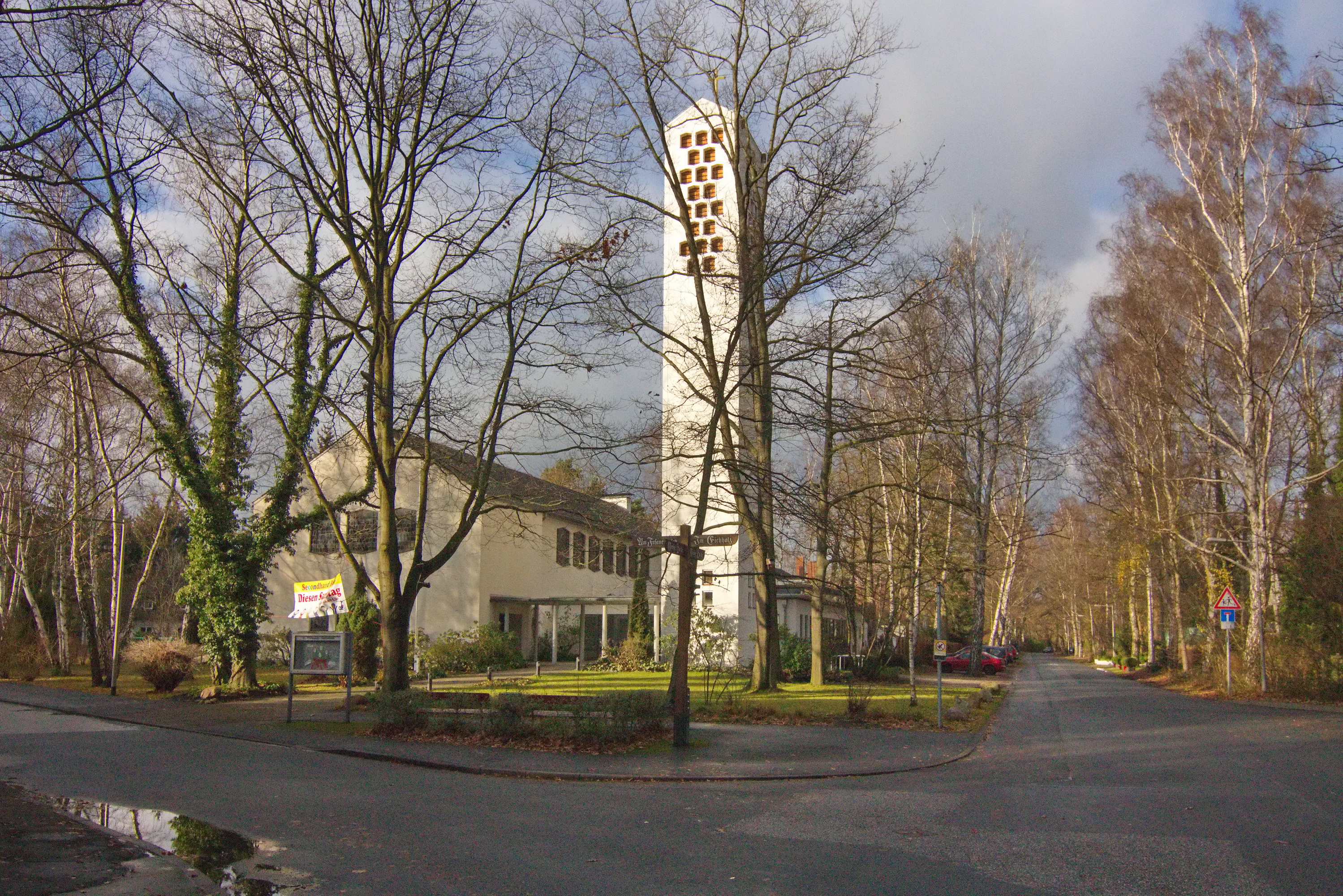 Die St.-Philippus-Kirche in Isernhagen-Süd (Hannover), Niedersachsen, Deutschland, wurde am 11.03. 1962 eingeweiht.